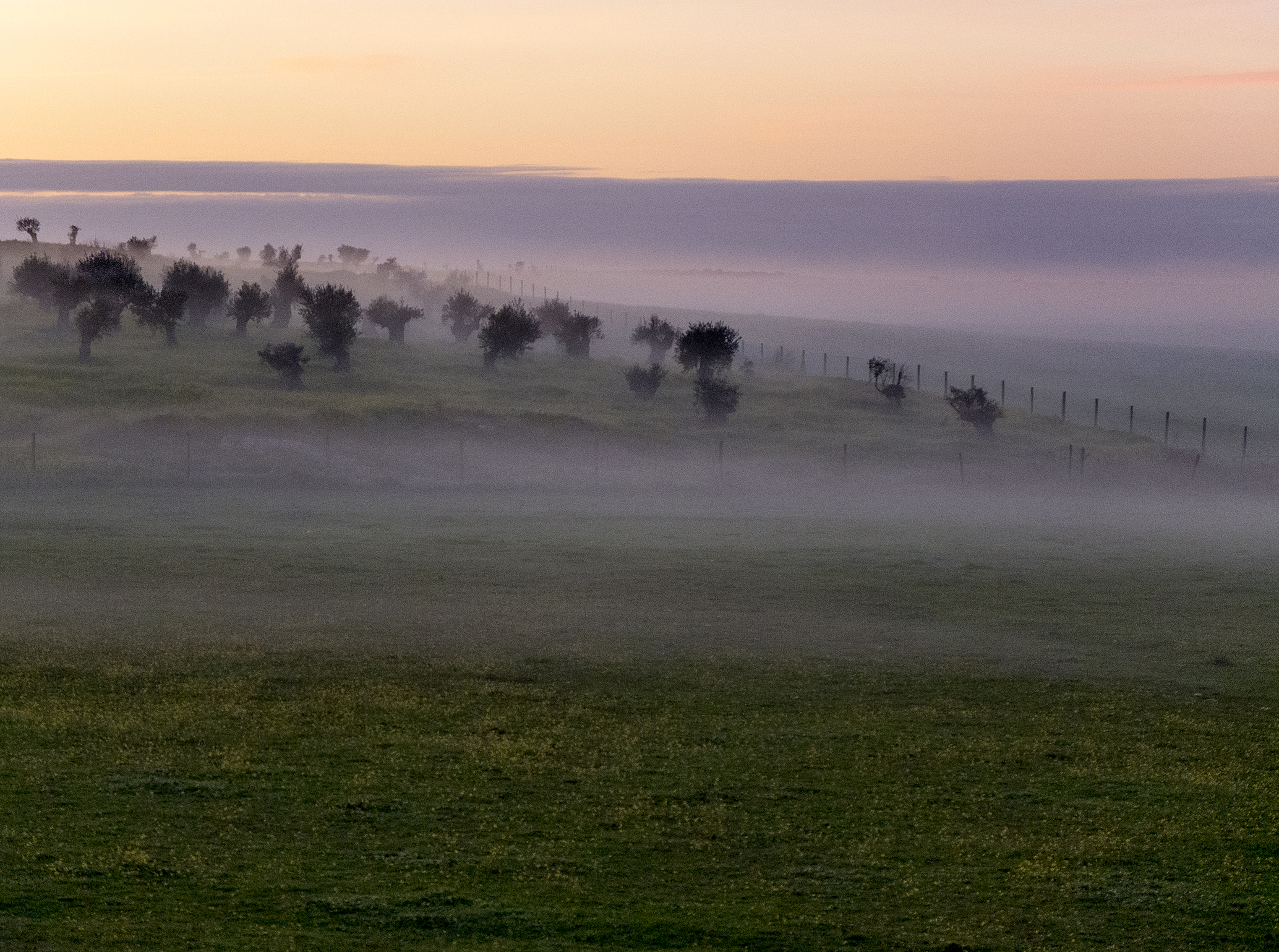 Imagen de la campiña extremeña, en algún lugar entre Cáceres y Mérida.